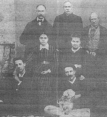 Francisco del Rosal Badía